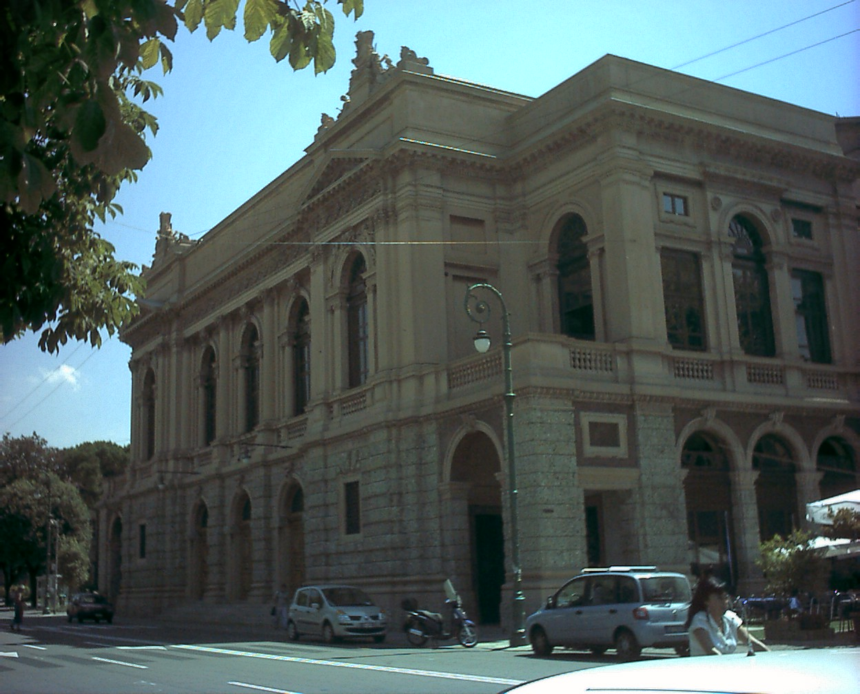 Teatro Gaetano Donizetti, Bergamo, Italy